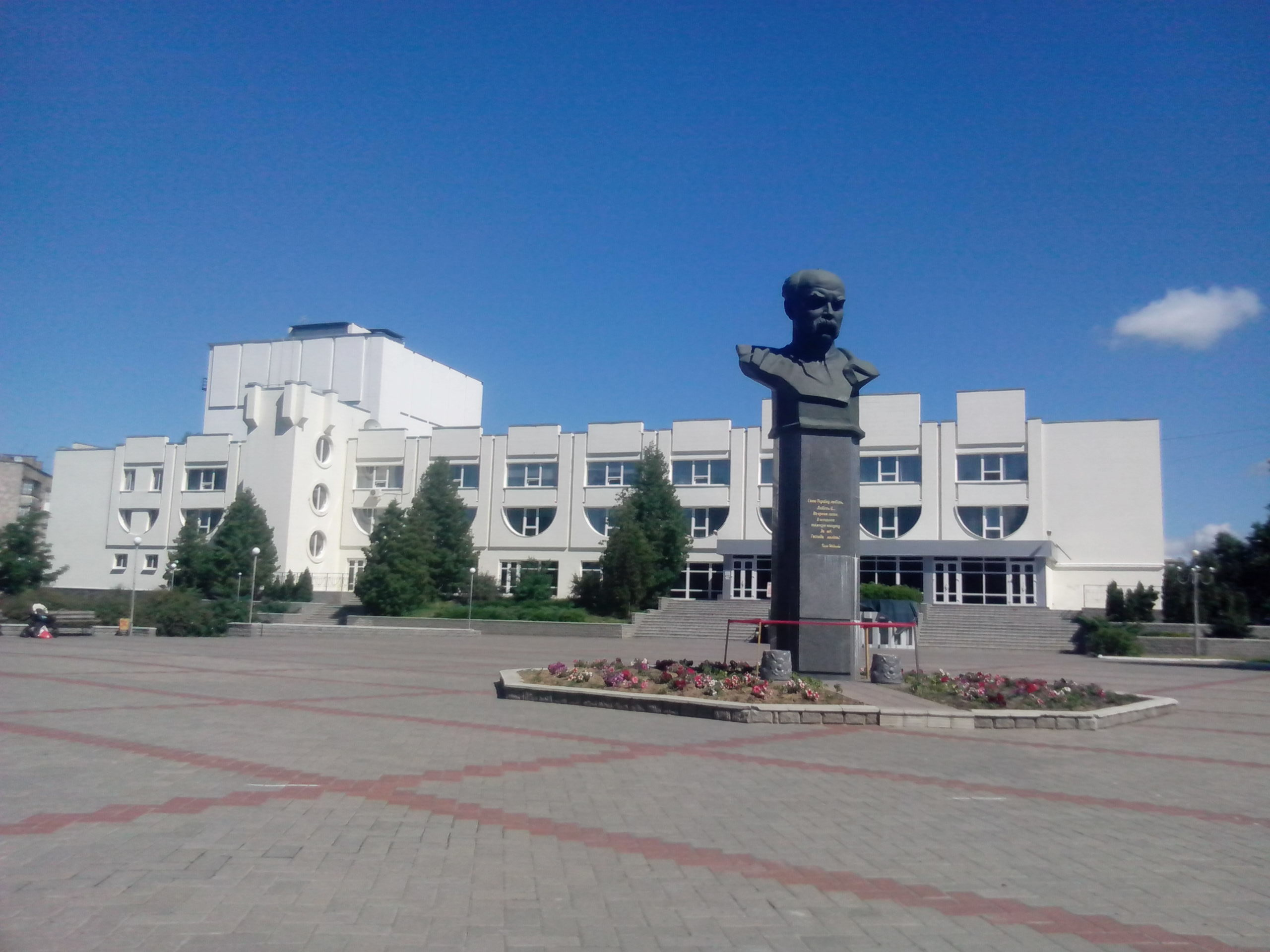 Бородянка. Пам'ятник Тарасові Шевченку на фоні районного Будинку культури.